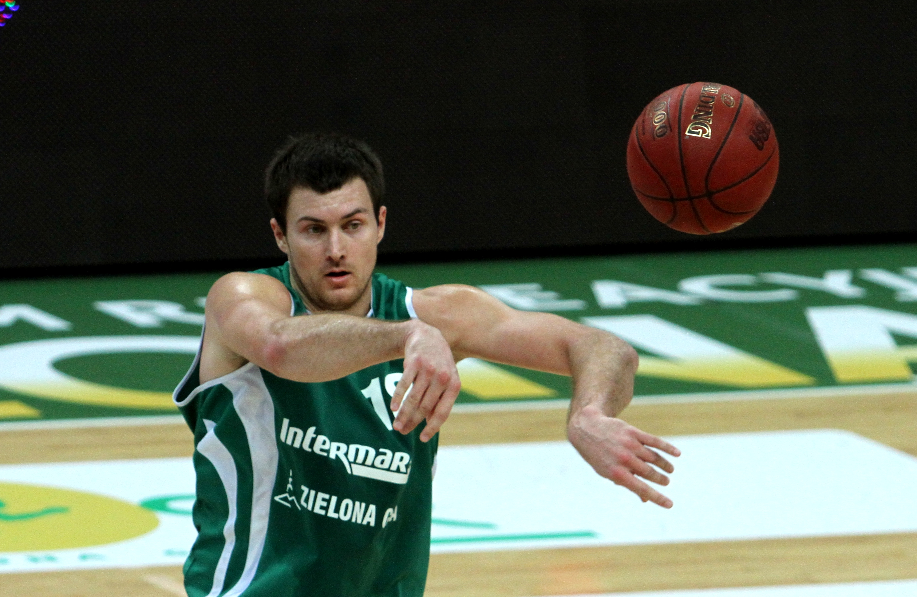 Vladimir Dragičević, Stelmet Zielona Góra